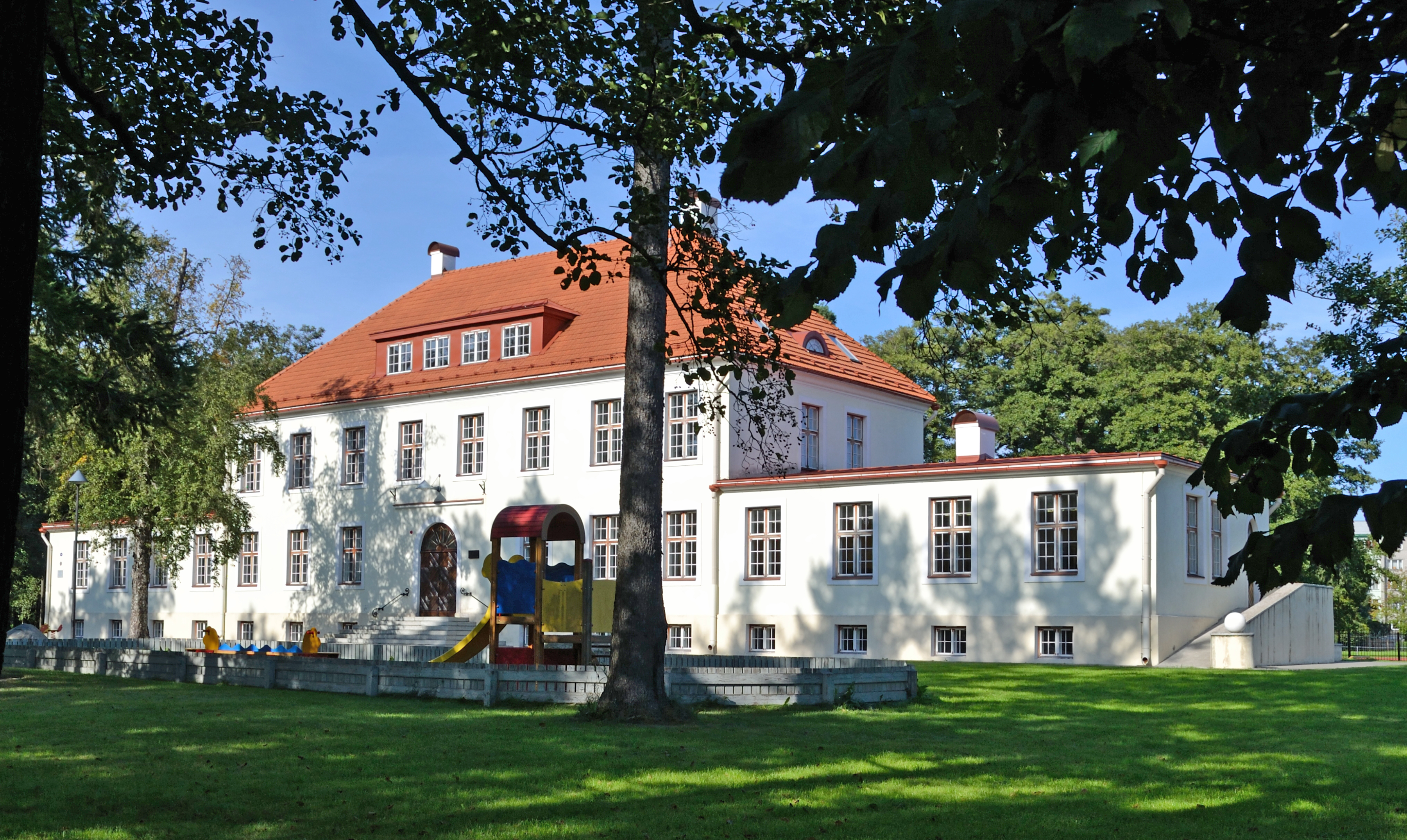 Tallinn, Kopli lastepäevakodu, 1928